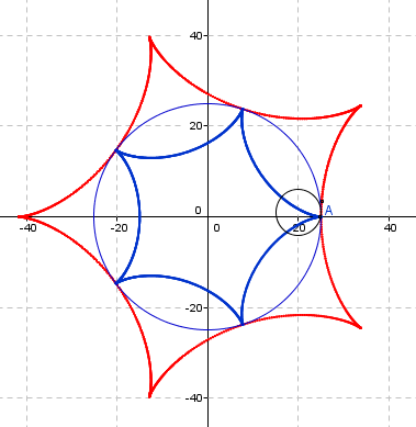 Evoluta de uma hipocicloide com k = 5, r = 5 e R = 25.